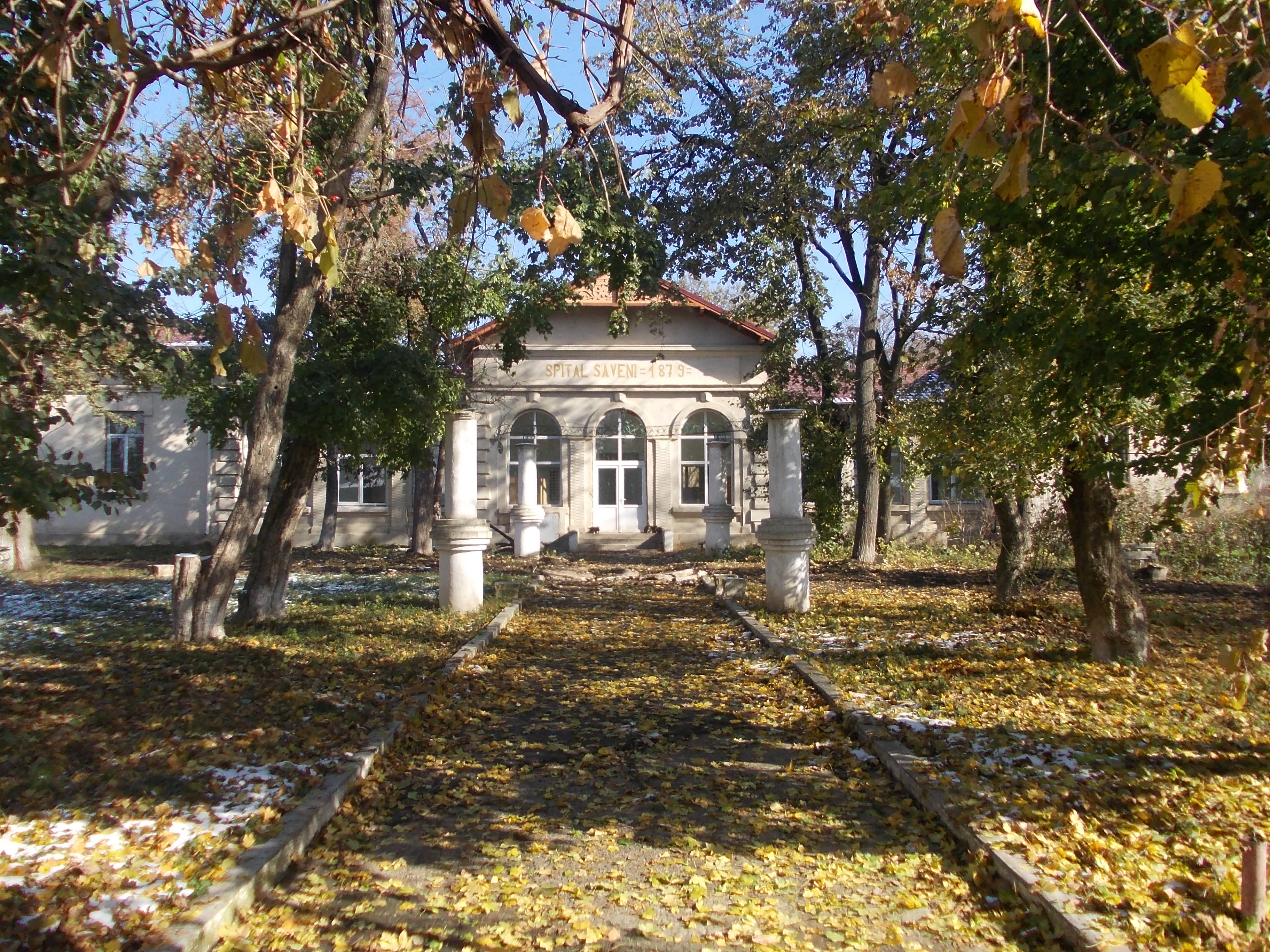 spitalul din Săveni,BT